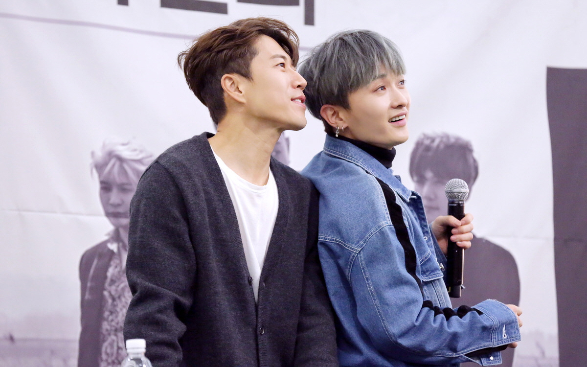 170504 젝스키스 팬사인회 은지원 이재진 김재덕 강성훈 장수원